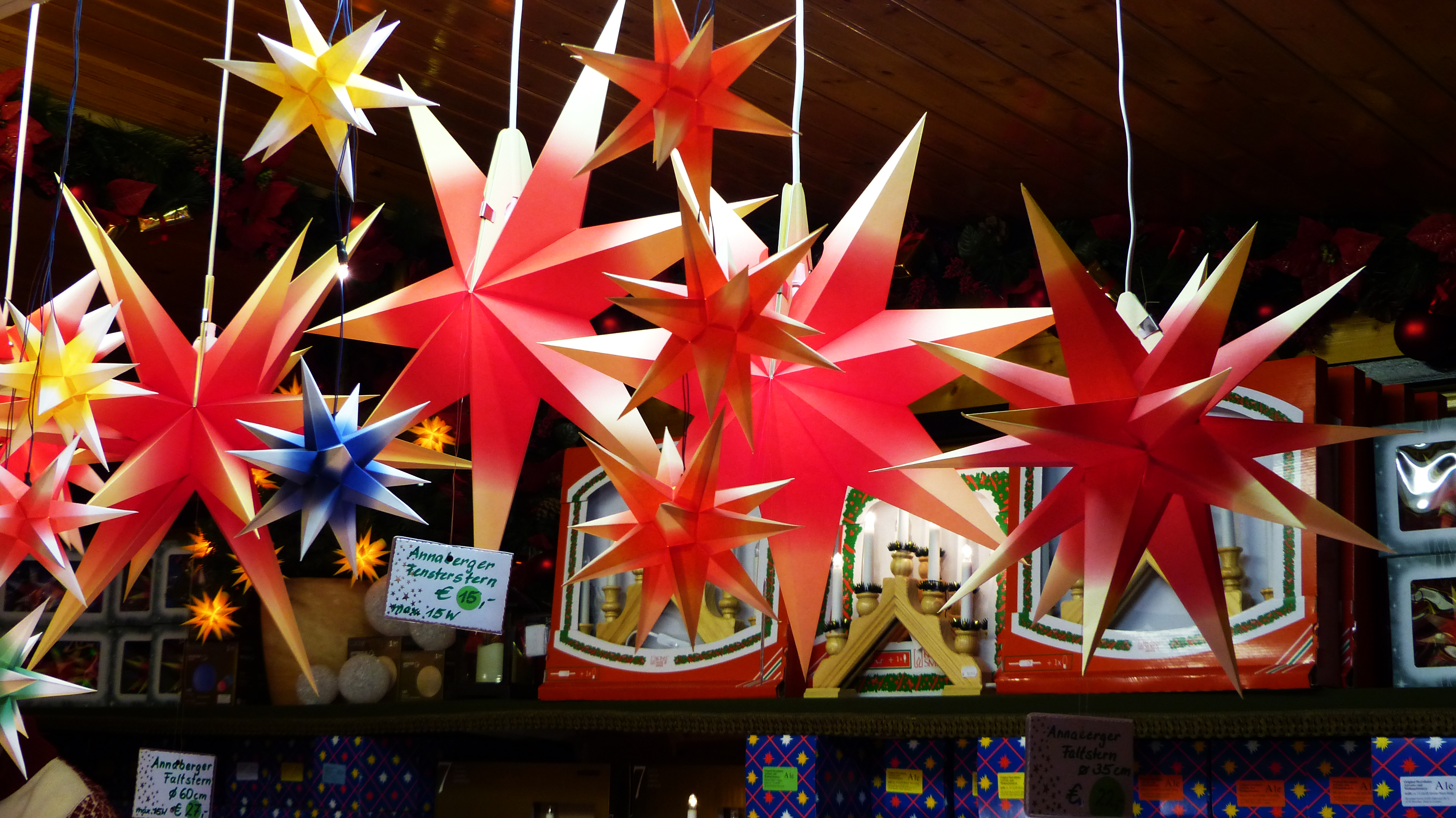 Annaberger Adventssterne auf dem Dresdner Striezelmarkt